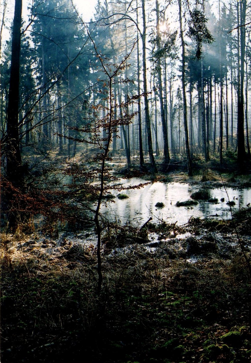 Autor: Adrian Grzegorz Rok wykonania: 2004